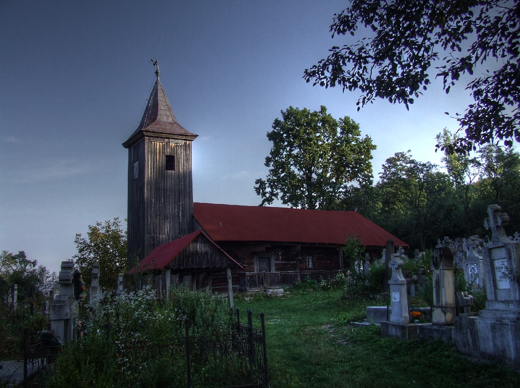 Petelea